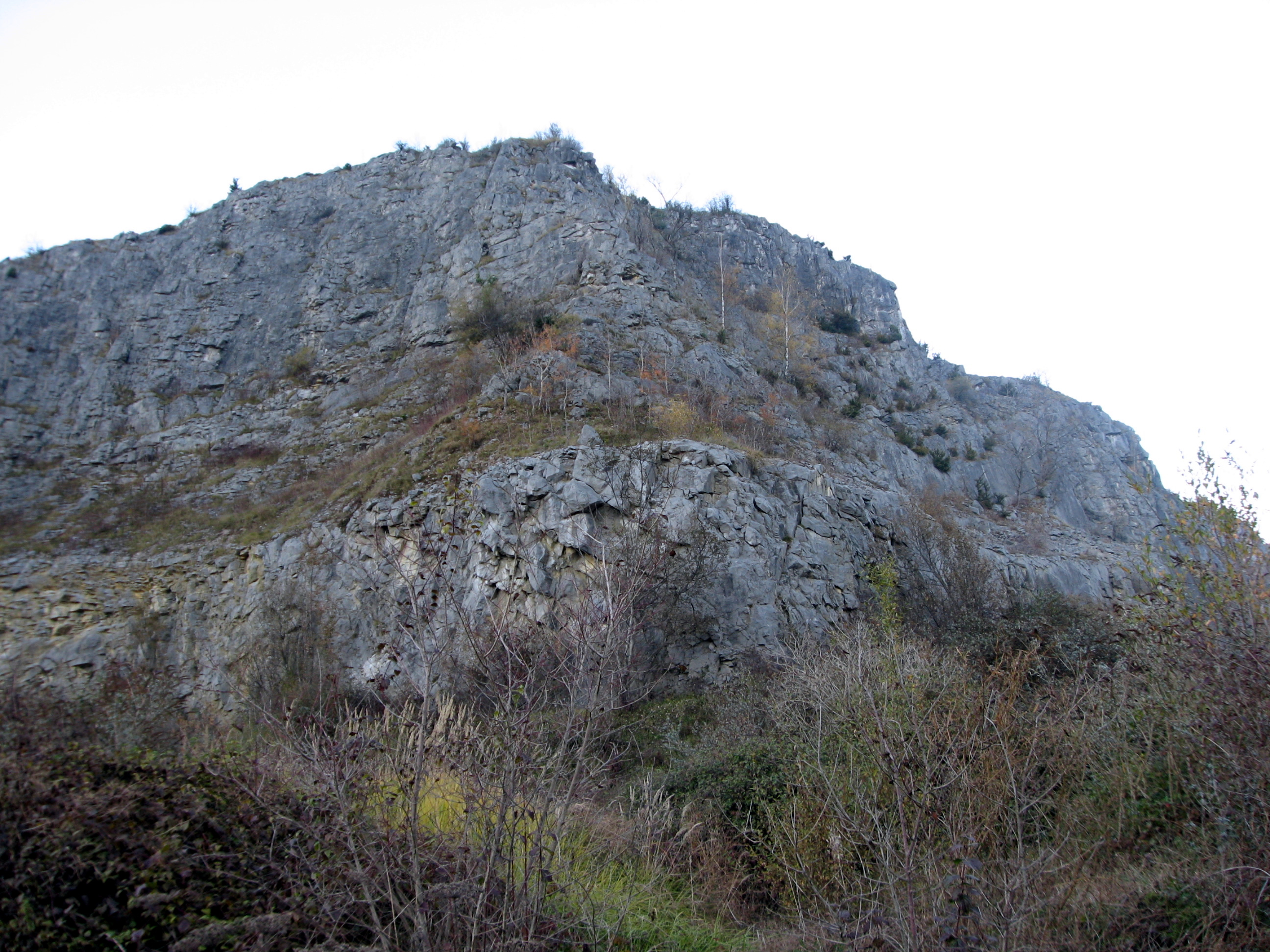 Promontoire rocheux du quaternaire à Arudy (Pyrénées-Atlantiques) (Pyrénées).